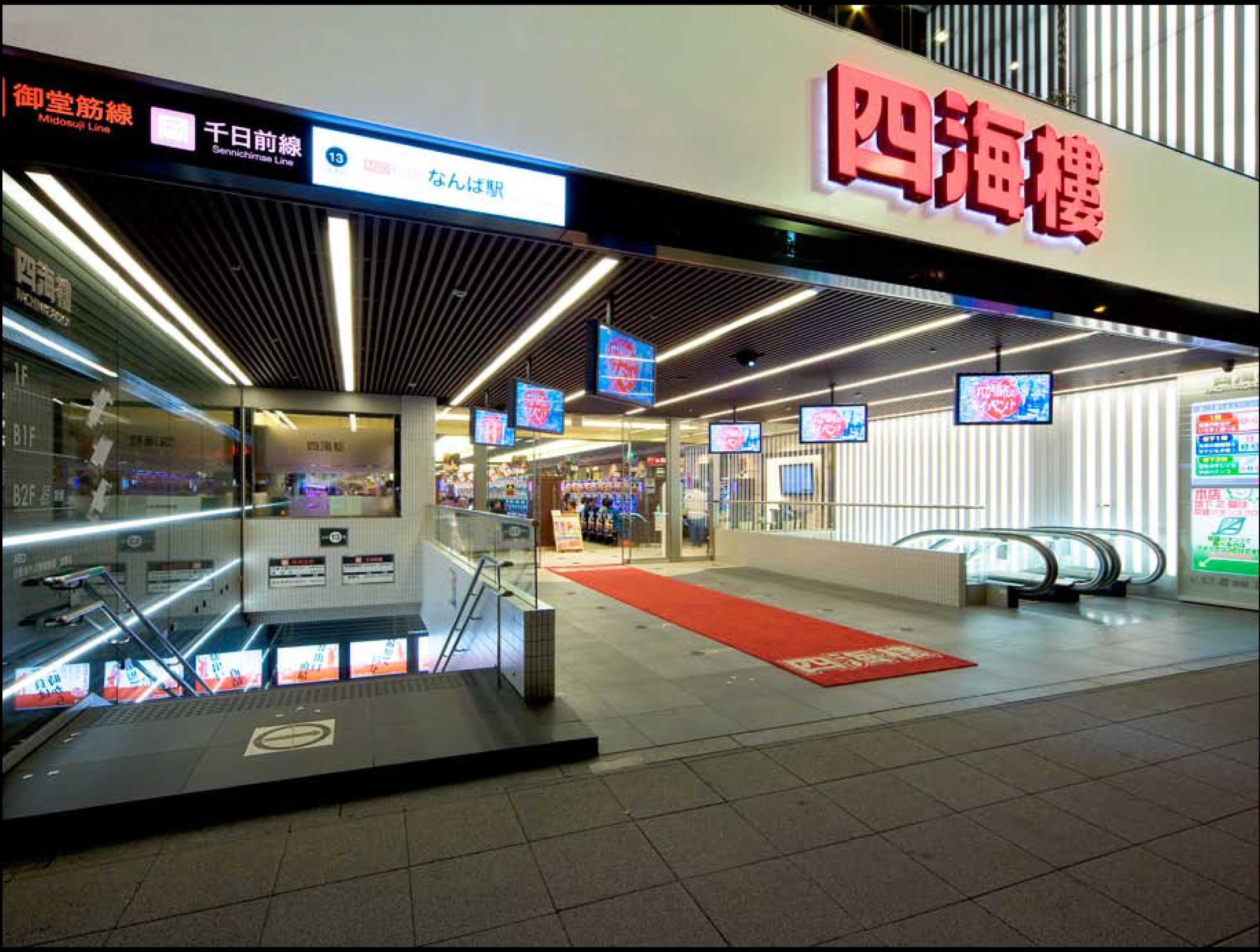 四海楼本店の店頭